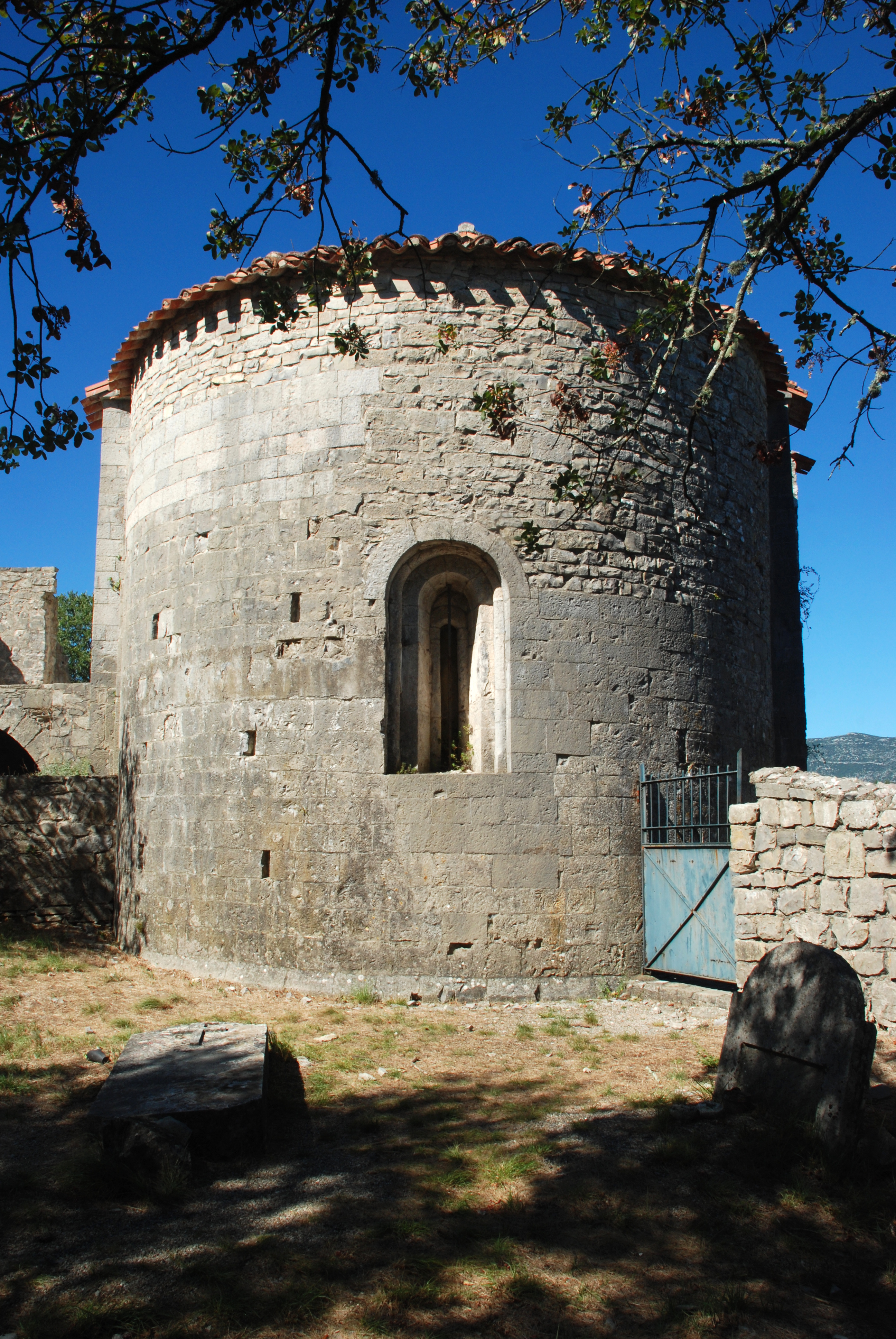 France - Hérault - Brissac - Chapelle Saint-Étienne d'Issensac